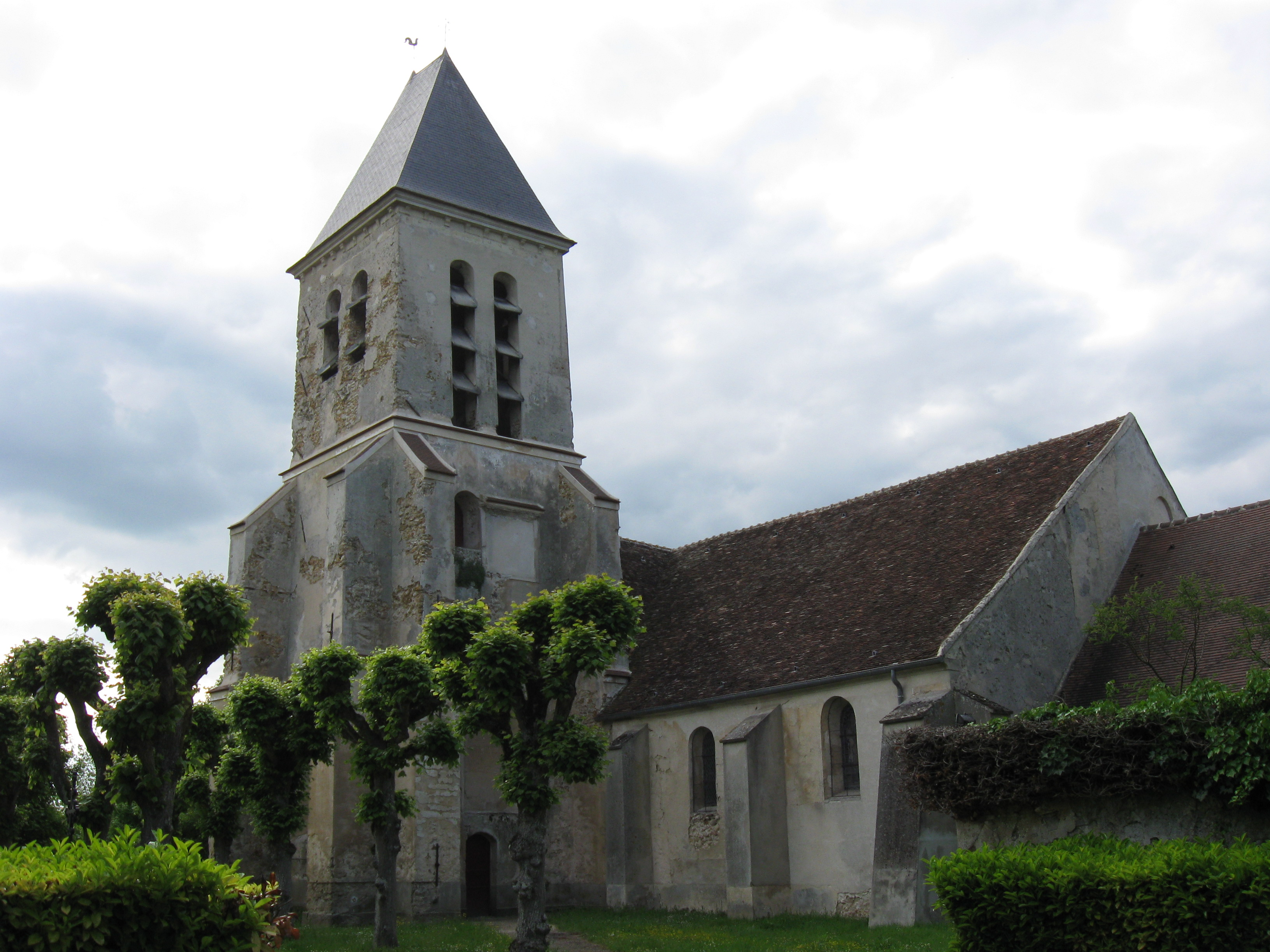 Église Saint-Donatien et Saint-Rogatien de Tancrou (département de la Seine-et-Marne, région Île-de-France).